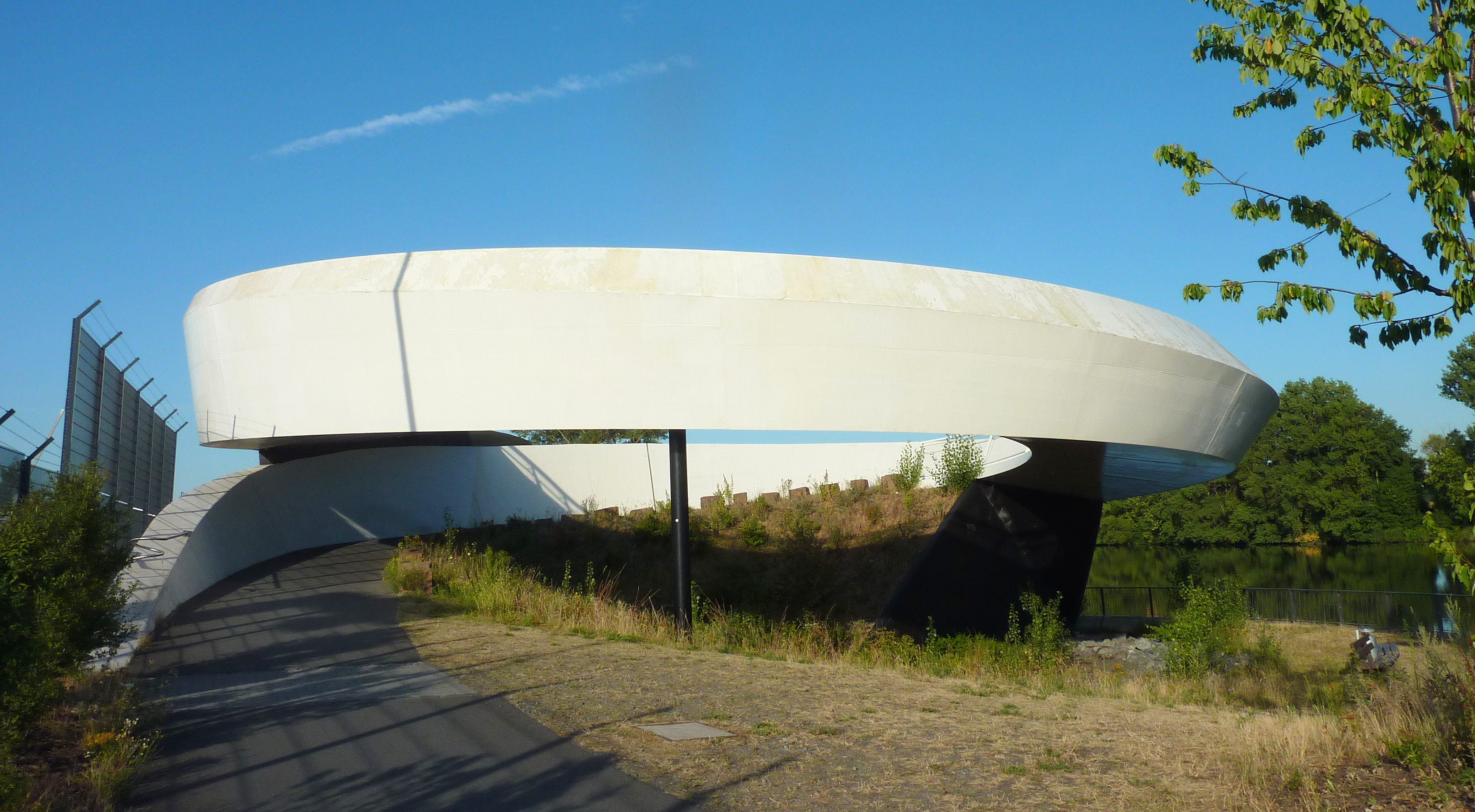 Die Ölhafenbrücke Raunheim ist eine im Jahr 2014 eröffnete, 170 Meter lange Fahrrad- und Fußgängerbrücke am Ufer des Mains in Hessen. Die Brücke steht auf der Gemarkung der zum südmainischen Kreis Groß-Gerau gehörenden Gemeinde Raunheim, die zugleich Bauherrin der Brücke ist. Das vom Frankfurter Architekturbüro Schneider + Schumacher entworfene Bauwerk führt über eine spiralförmig angelegte Rampe über den am linken Mainufer liegenden Raunheimer Ölhafen. Der Hafen mit angeschlossenem Tanklager ist ein Umschlagplatz der regionalen Binnenschifffahrt für Treibstoffe zur Versorgung des benachbarten Frankfurter Flughafens. Ansicht der Brücke von Osten, links im Vordergrund der Beginn der spiralförmigen Zufahrtsrampe